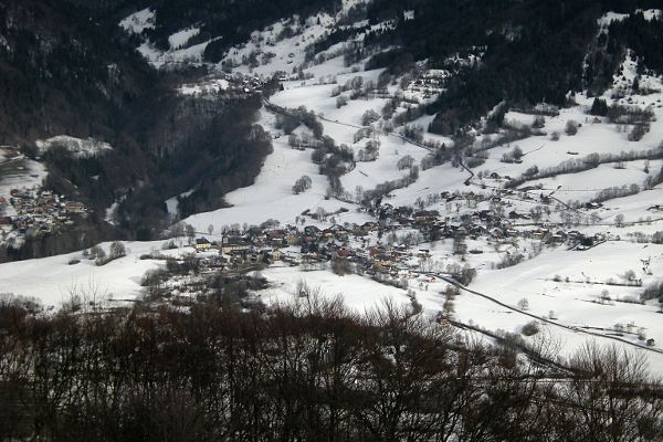 Village de Jarsy